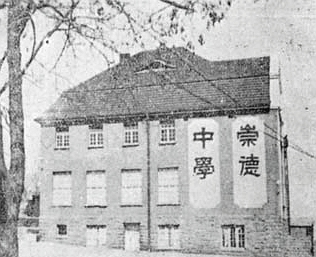 青岛崇德中学